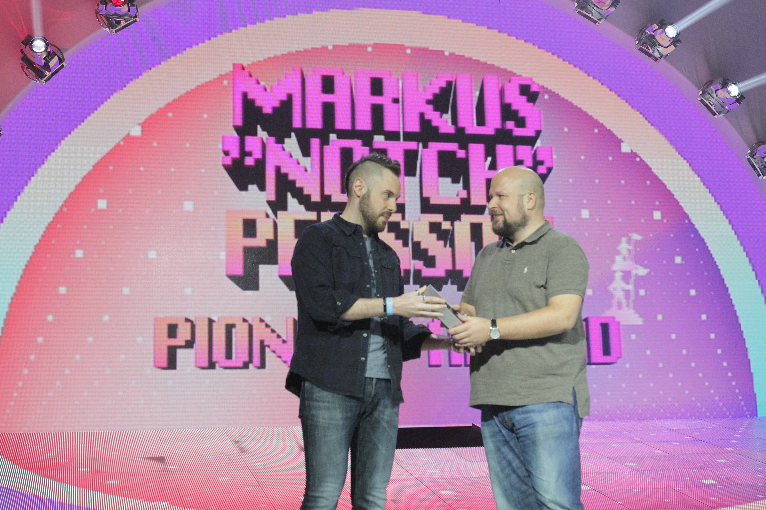 16-20_42_20-01-7D2_0728